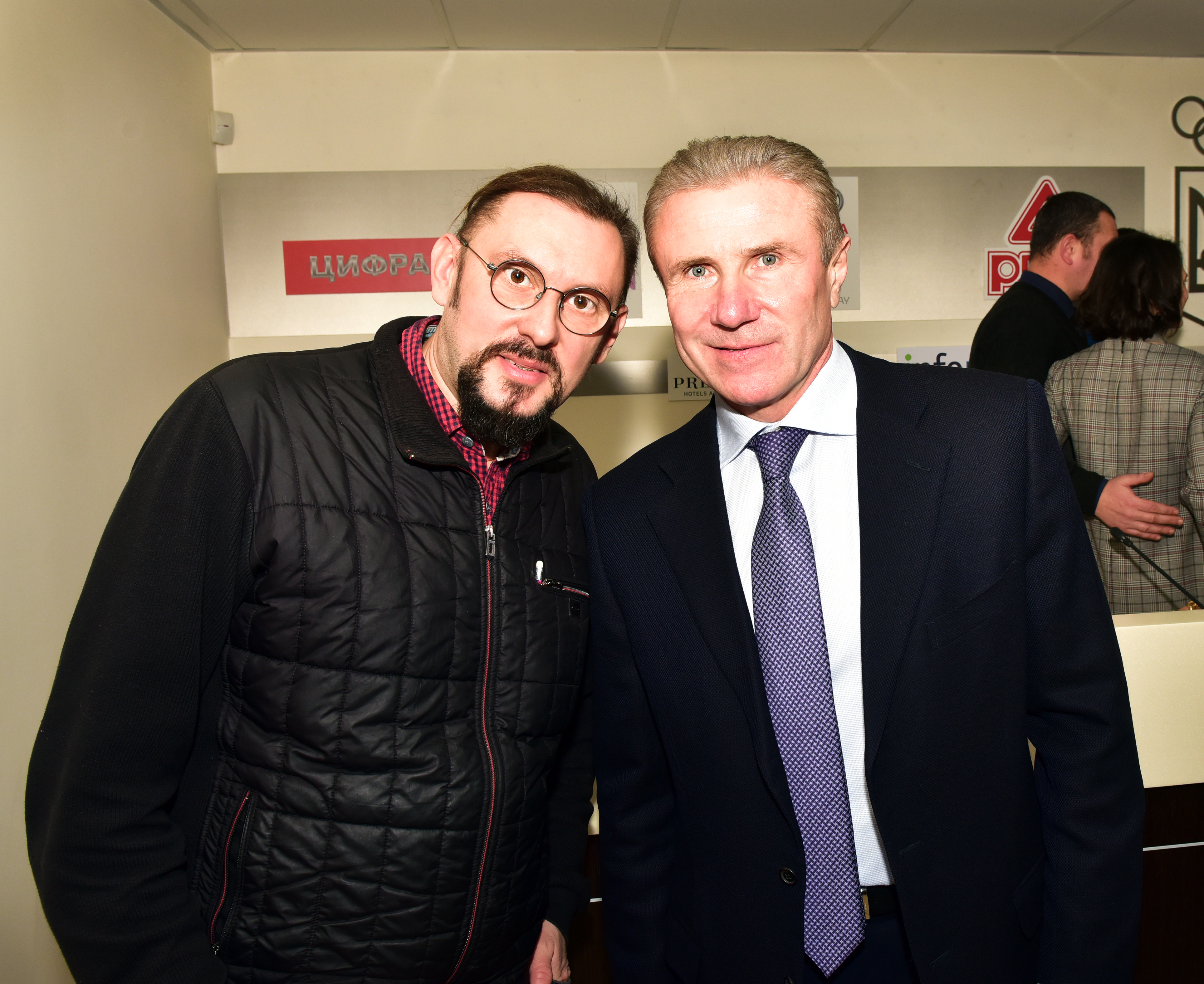 Сергій Аніськов з Президентом Національного олімпійського комітету України Cергієм Бубка